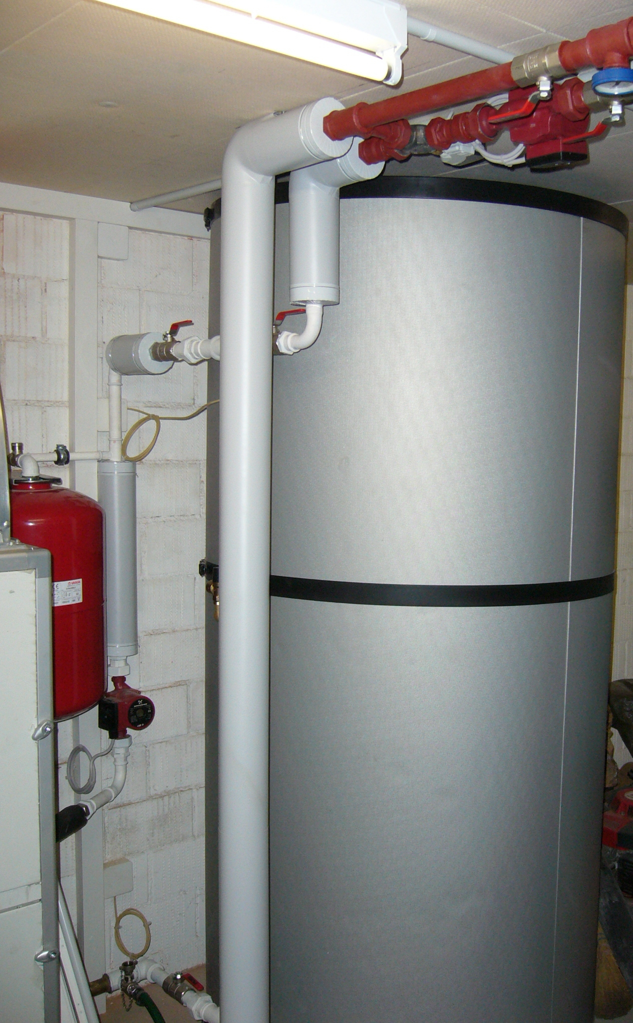 Wassertank einer Wärmepumpenheizung, welche die Wärme aus der Umgebungsluft entzieht.